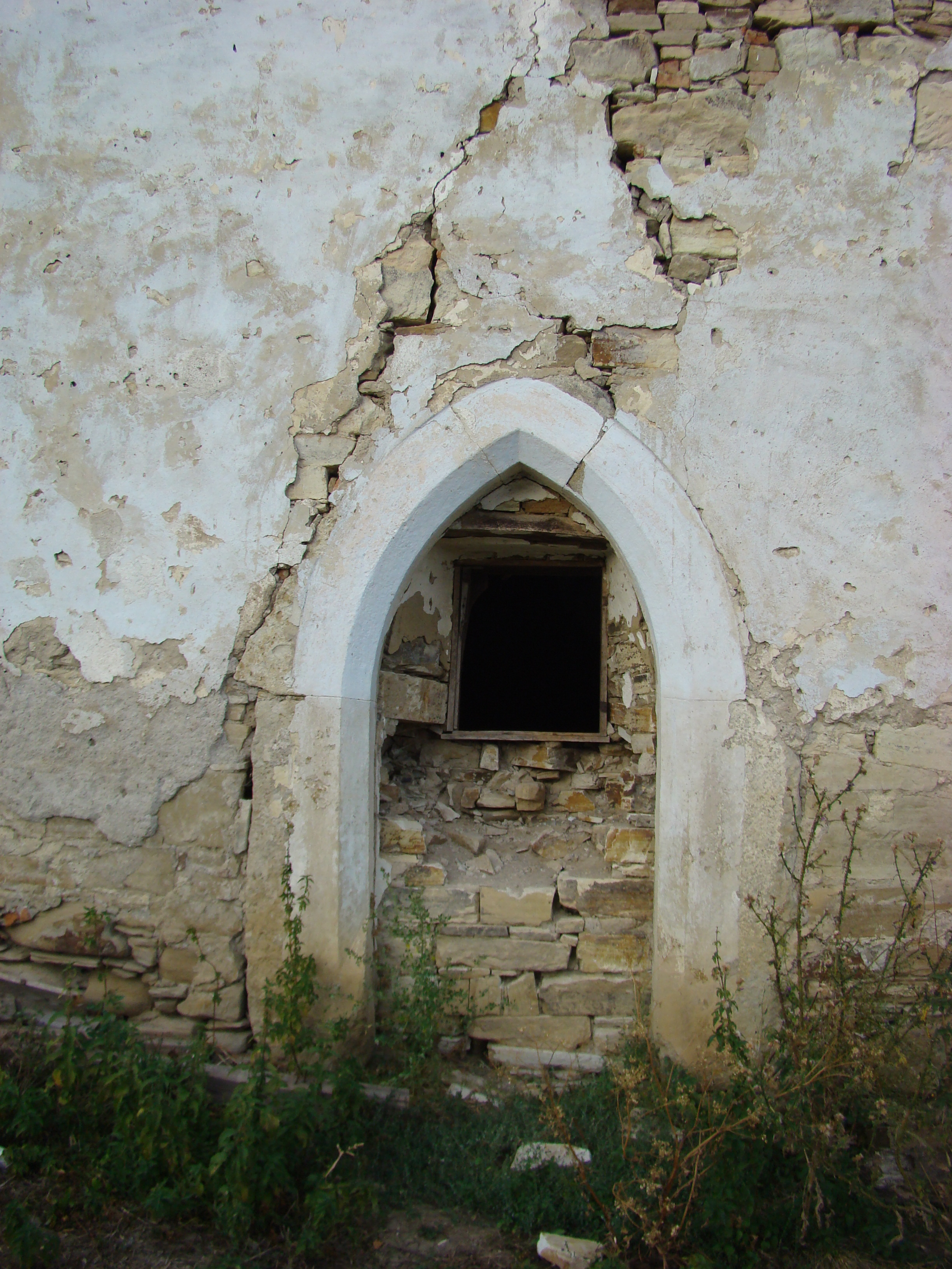 Biserica evanghelică C.A., azi biserica ortodoxă "Sf. Arhg. Mihail si Gavriil", sat CORVINEŞTI; comuna MATEI